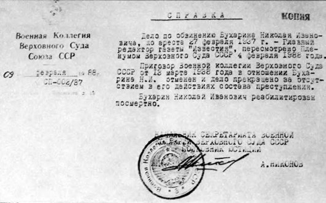 Копия справки о посмертной реабилитации Николая Ивановича Бухарина. Выдана Военной коллегией Верховного суда СССР 9 февраля 1988 года.